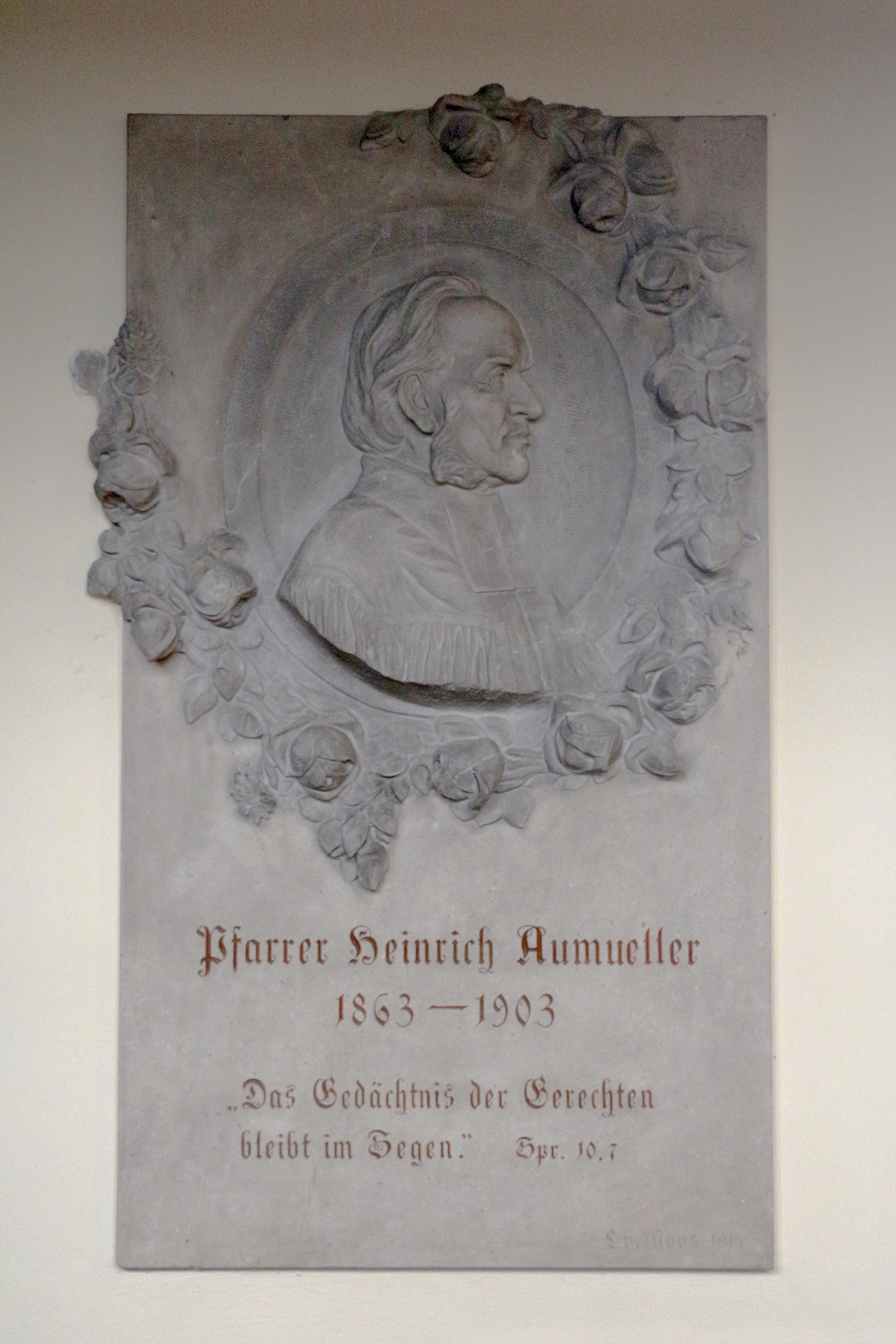 Heinrich Aumüller, erster, aus Coburg stammender Pfarrer der evangelischen Gemeinde Christuskirche Salzburg